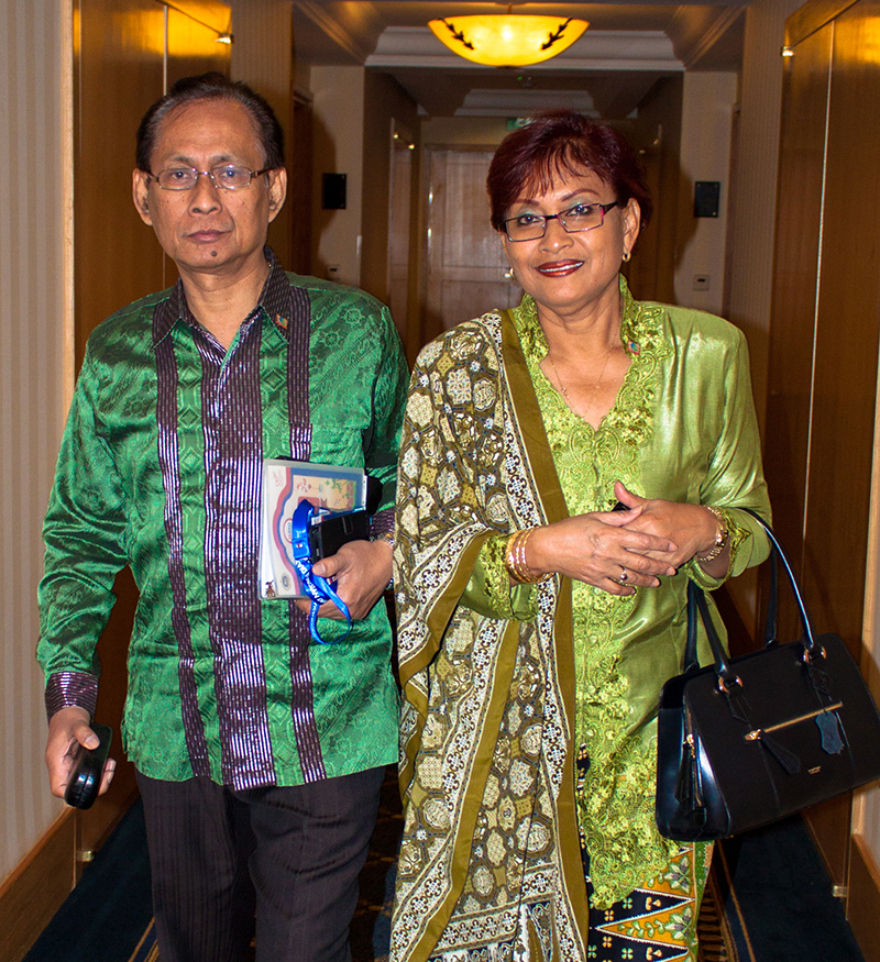 Soewarto moestadja en zijn partner